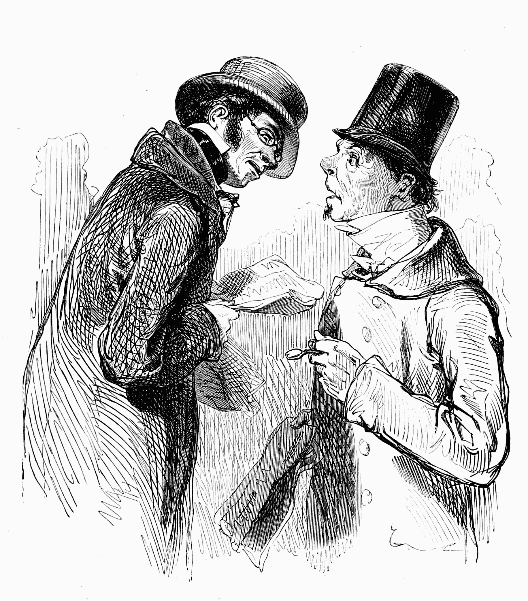 Politiqueurs. - d368 - Mosieu ! je n’ai pas l’honneur de vous connaître.